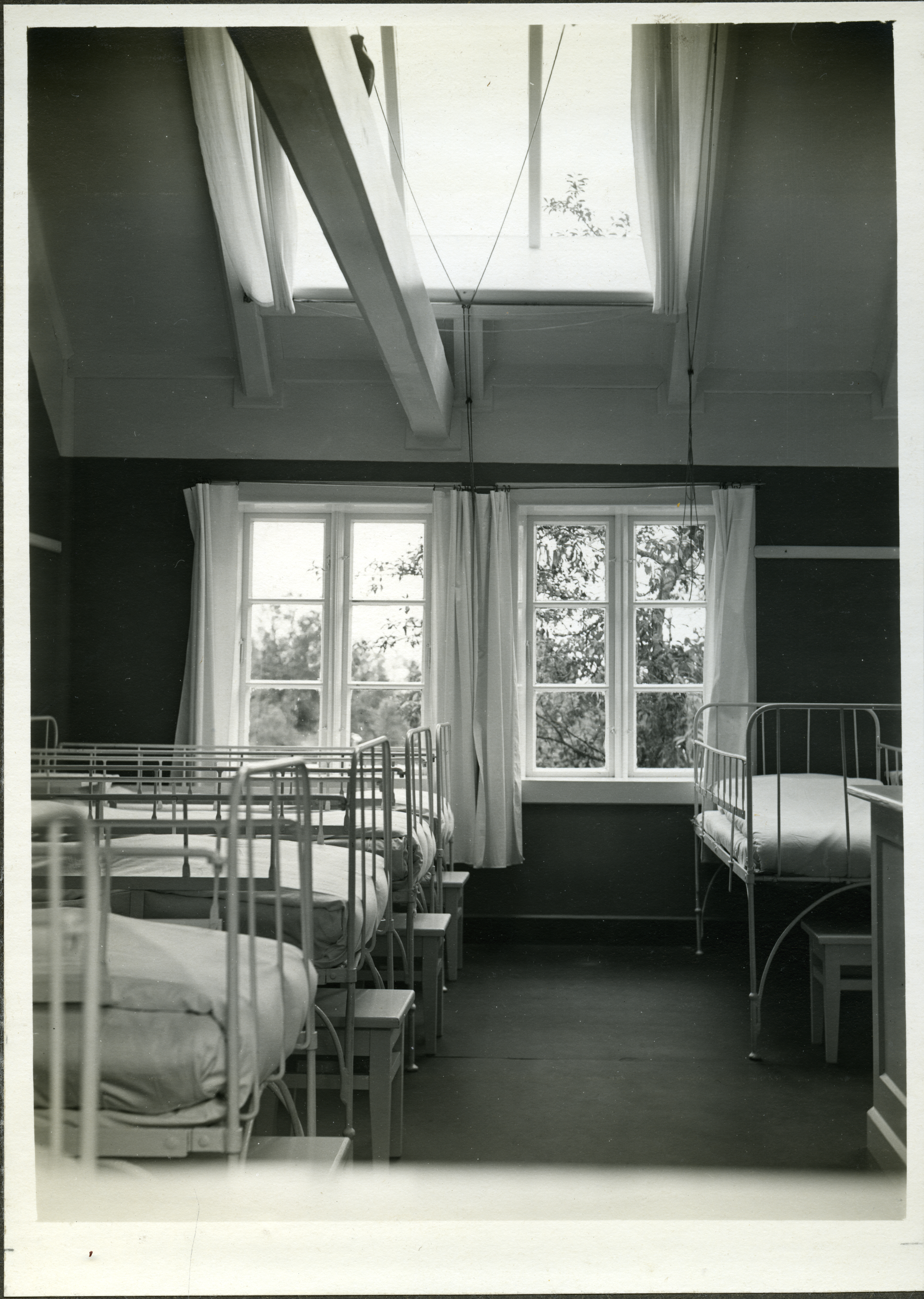 Bildet er hentet fra Arkivverket. Original bildetekst: Interiør fra "Karistuen". Isolationsbarakken Arkivinstitusjon : Riksarkivet Arkivnavn : Medisinaldirektøren, Overlegen for tuberkulosen/Ktr. for lege- og sunnhetsvesen, tuberkulosesaker Sted : Norge, Hordaland, Osen, Emneord: Sykehus, Tuberkulose Avbildet